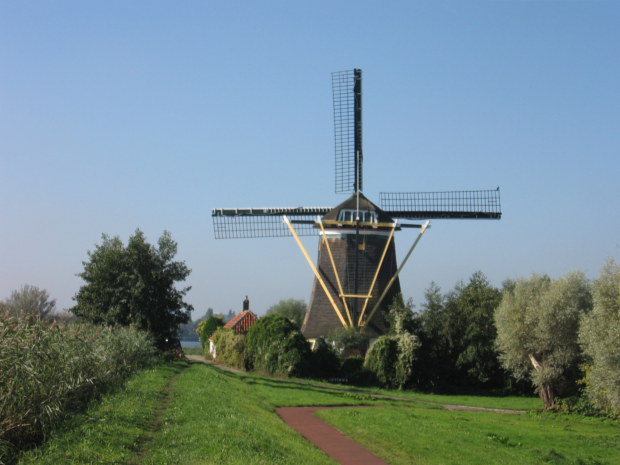 De Prinsenmolen, Hillegersberg, Zuid-Holland